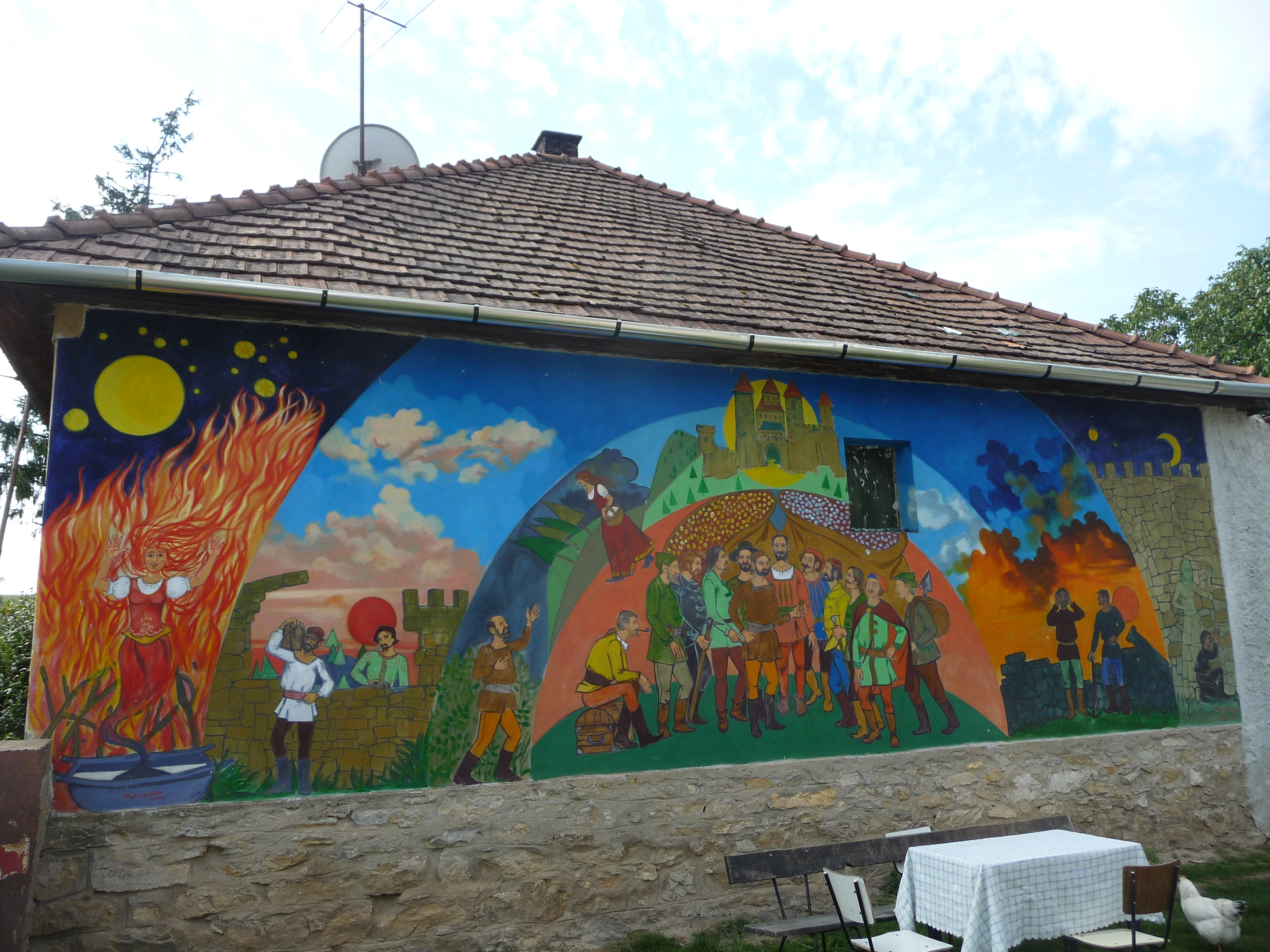 Ferkovics József: Déva vára — secco (Bódvalenke)